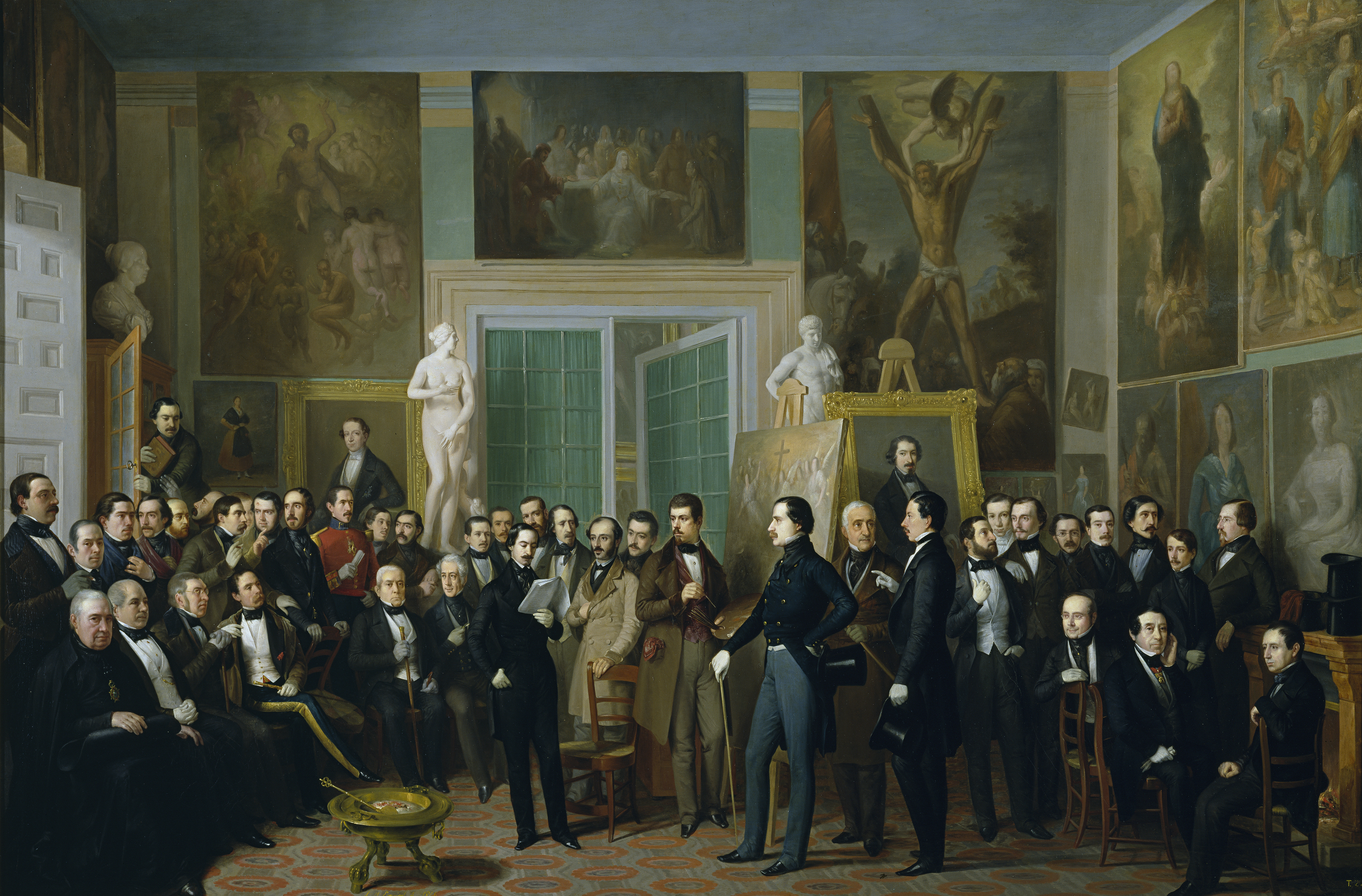 Esta obra es el cuadro más célebre del pintor sevillano Antonio María Esquivel (1806-1857), y una de las más destacadas del Romanticismo español. Los personajes que aparecen retratados, además del propio pintor, son los siguientes: Antonio Ferrer del Río (1814-1872), Juan Eugenio Hartzenbusch (1806-1880), Juan Nicasio Gallego (1777-1853), Antonio Gil y Zárate (1793-1861), Tomás Rodríguez Rubí (1817-1890), Isidoro Gil y Baus (1814-1866), Cayetano Rosell y López (1817-1883), Antonio Flores (1818-1866), Manuel Bretón de los Herreros (1796-1873), Francisco González Elipe, Patricio de la Escosura (1807-1878), José María Queipo de Llano, conde de Toreno (1786-1843), Antonio Ros de Olano (1808-1887), Joaquín Francisco Pacheco (1808-1865), Mariano Roca de Togores (1812-1889), Juan González de la Pezuela (1809-1906), Ángel de Saavedra, duque de Rivas (1791-1865), Gabino Tejado (1819-1891), Javier de Burgos (1778-1848), José Amador de los Ríos (1818-1878), Francisco Martínez de la Rosa (1787-1862), Carlos García Doncel (ca.1815-1850), Luis Valladares y Garriga (?-1856), José Zorrilla (1817-1893), José Güell y Renté (1818-1884), José Fernández de la Vega, Ventura de la Vega (1807-1865), Luis de Olona (1823-1863), Julián Romea (1818-1863), Manuel José Quintana (1772-1857), José de Espronceda (1808-1842), José María Díaz (1813-1888), Ramón de Campoamor (1817-1901), Manuel Cañete (1822-1891), Pedro de Madrazo y Kuntz (1816-1898), Aureliano Fernández Guerra (1816-1891), Ramón de Mesonero Romanos (1803-1882), Cándido Nocedal (1821-1885), Gregorio Romero de Larrañaga (1814-1872), Bernardino Fernández de Velasco y Pimentel, duque de Frías (1873-1851), Eusebio Asquerino (1822-1892), Manuel Juan Diana (1814-1881) y Agustín Durán (1793-1862).